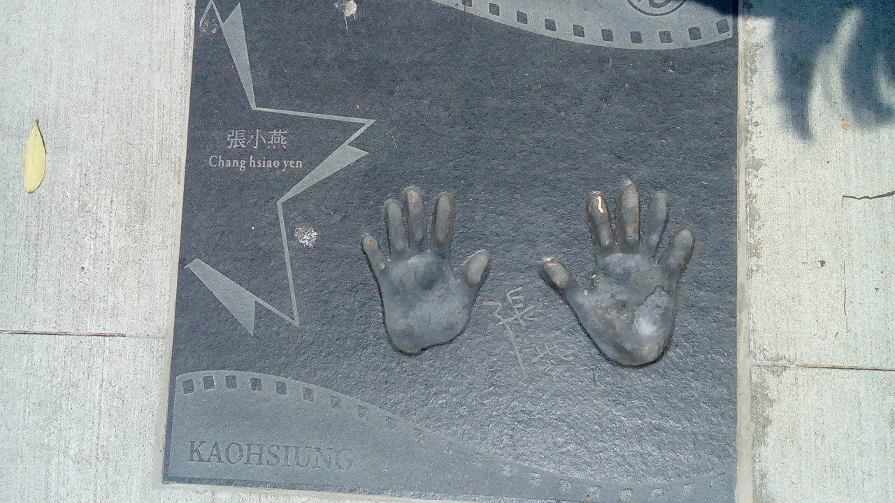 中文（台灣）: 高雄市愛河星光大道的張小燕手印。愛河星光大道約莫位於五福三路與河東路(海邊路)口，成立初期共有50餘位影星(如藍正龍、張小燕等人)參與拓建手模。